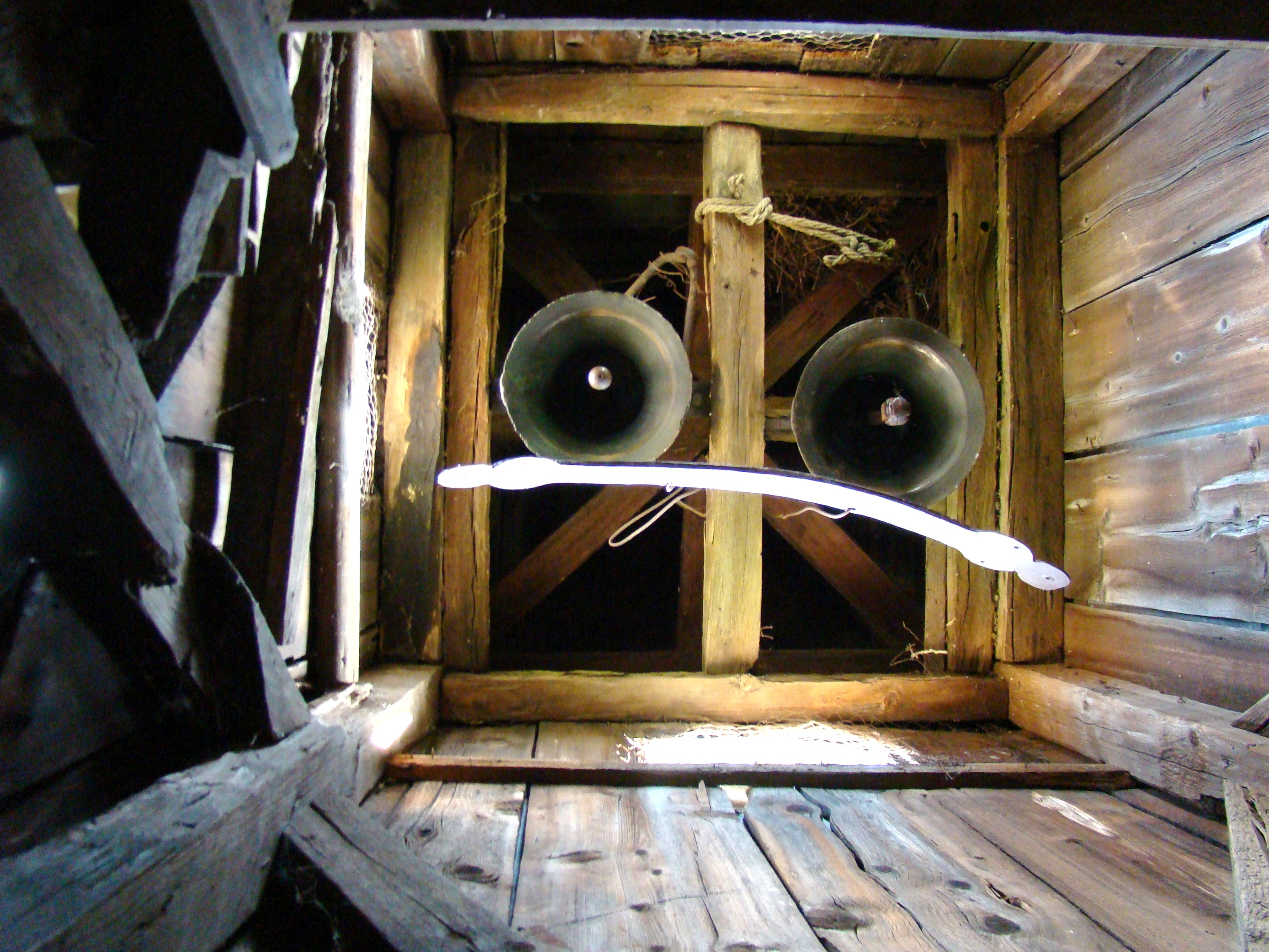 Biserica de lemn, sat aparţinător SFÂNTU GHEORGHE; oraş IERNUT